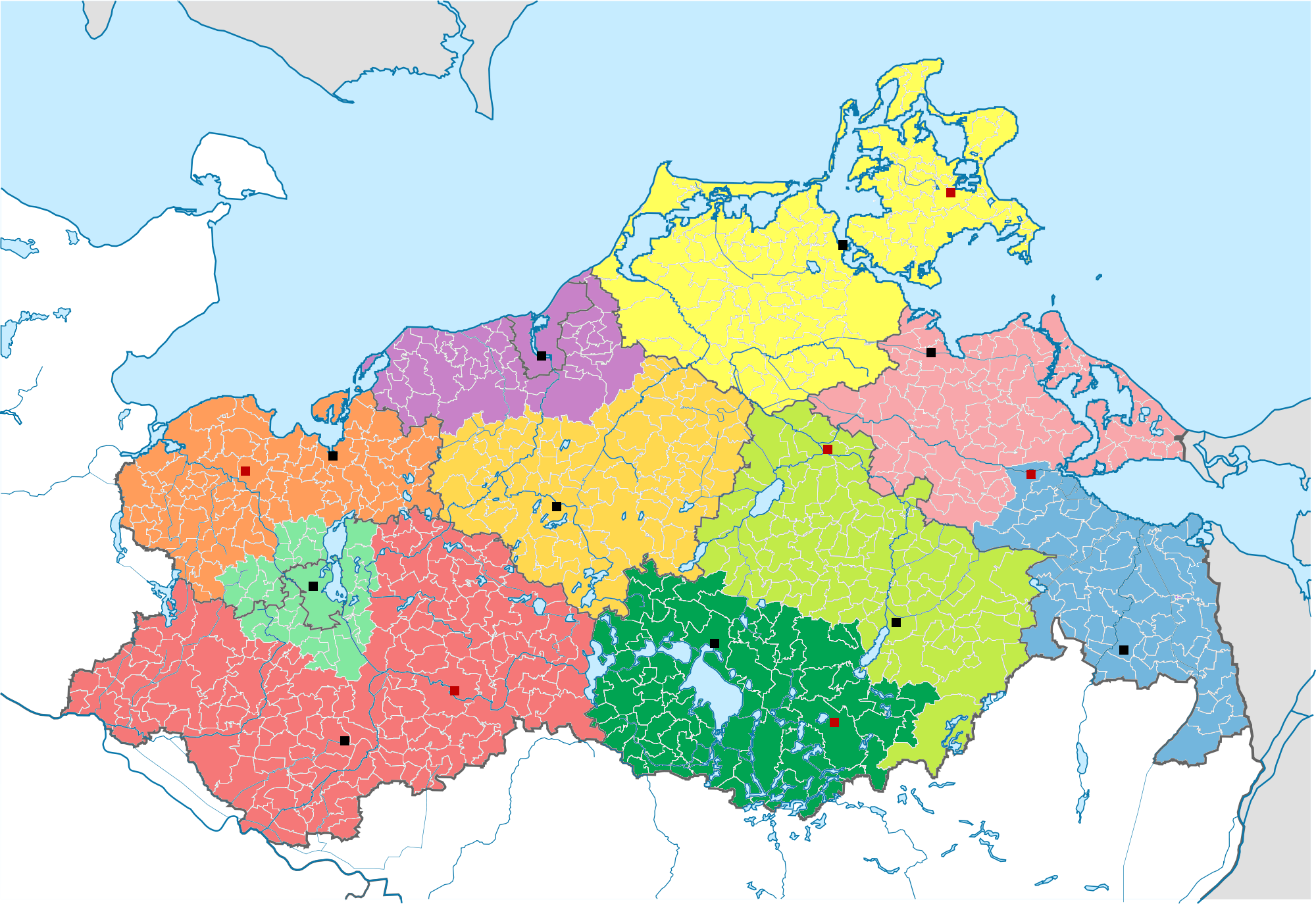 Karte der Amtsgerichtsbezirke in Mecklenburg-Vorpommern nach zum 27. Februar 2017 vollständig erfolgter Umsetzung der Gerichtsstrukturreform. Schwarze Quadrate die Gerichtsstandorte, rote Quadrate die Außenstellen. Bezirk des Landgerichtes Schwerin: Amtsgericht Schwerin Amtsgericht Ludwigslust Amtsgericht Wismar Bezirk des Landgerichtes Rostock: Amtsgericht Rostock Amtsgericht Güstrow Bezirk des Landgerichtes Stralsund: Amtsgericht Stralsund Amtsgericht Greifswald Bezirk des Landgerichtes Neubrandenburg: Amtsgericht Waren (Müritz) Amtsgericht Neubrandenburg Amtsgericht Pasewalk